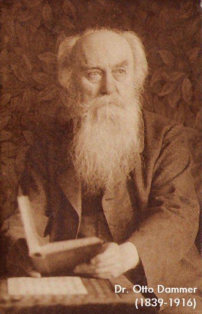 Porträt von Dr. Otto Dammer (1839-1916)